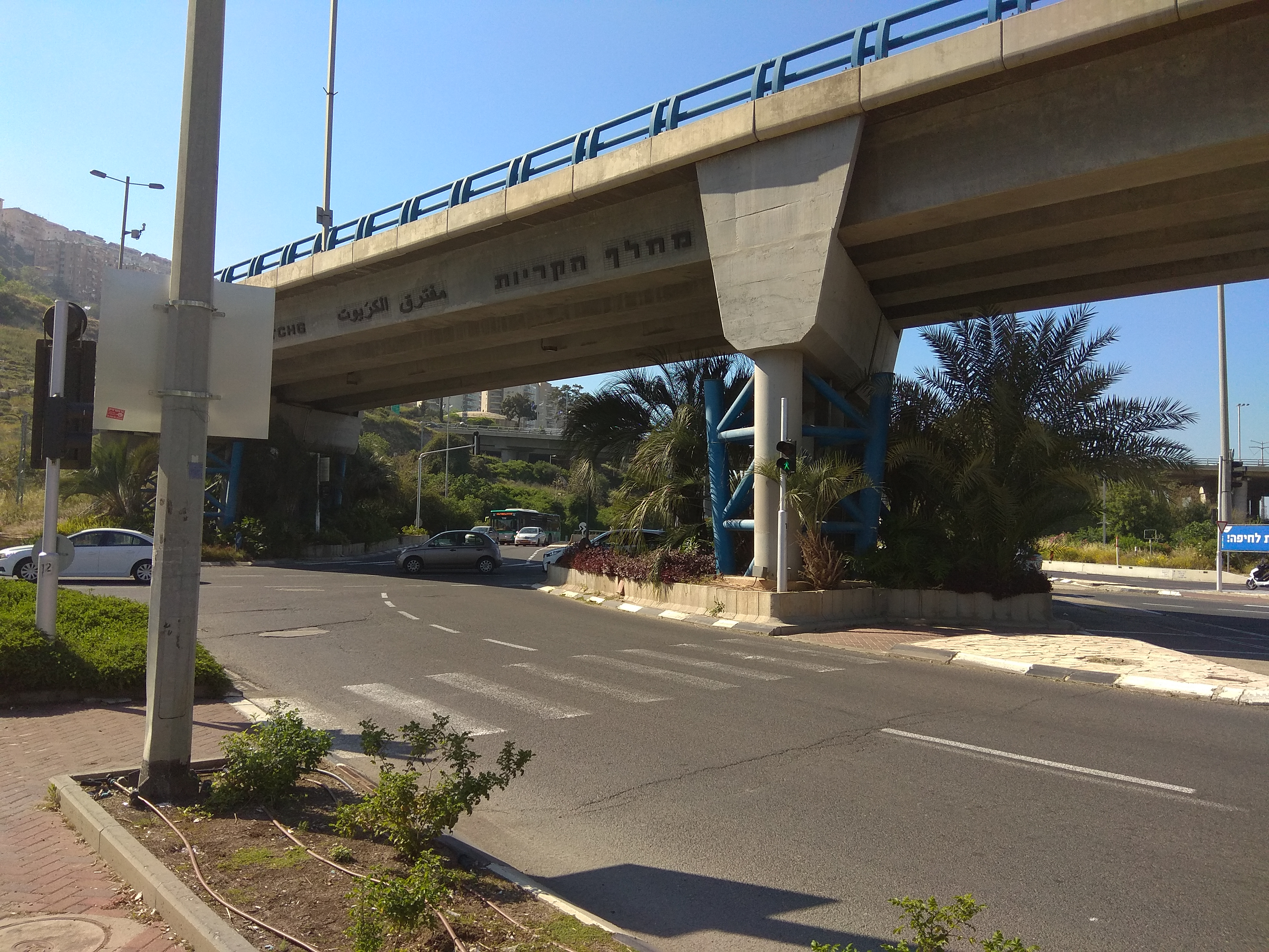 מחלף הקריות